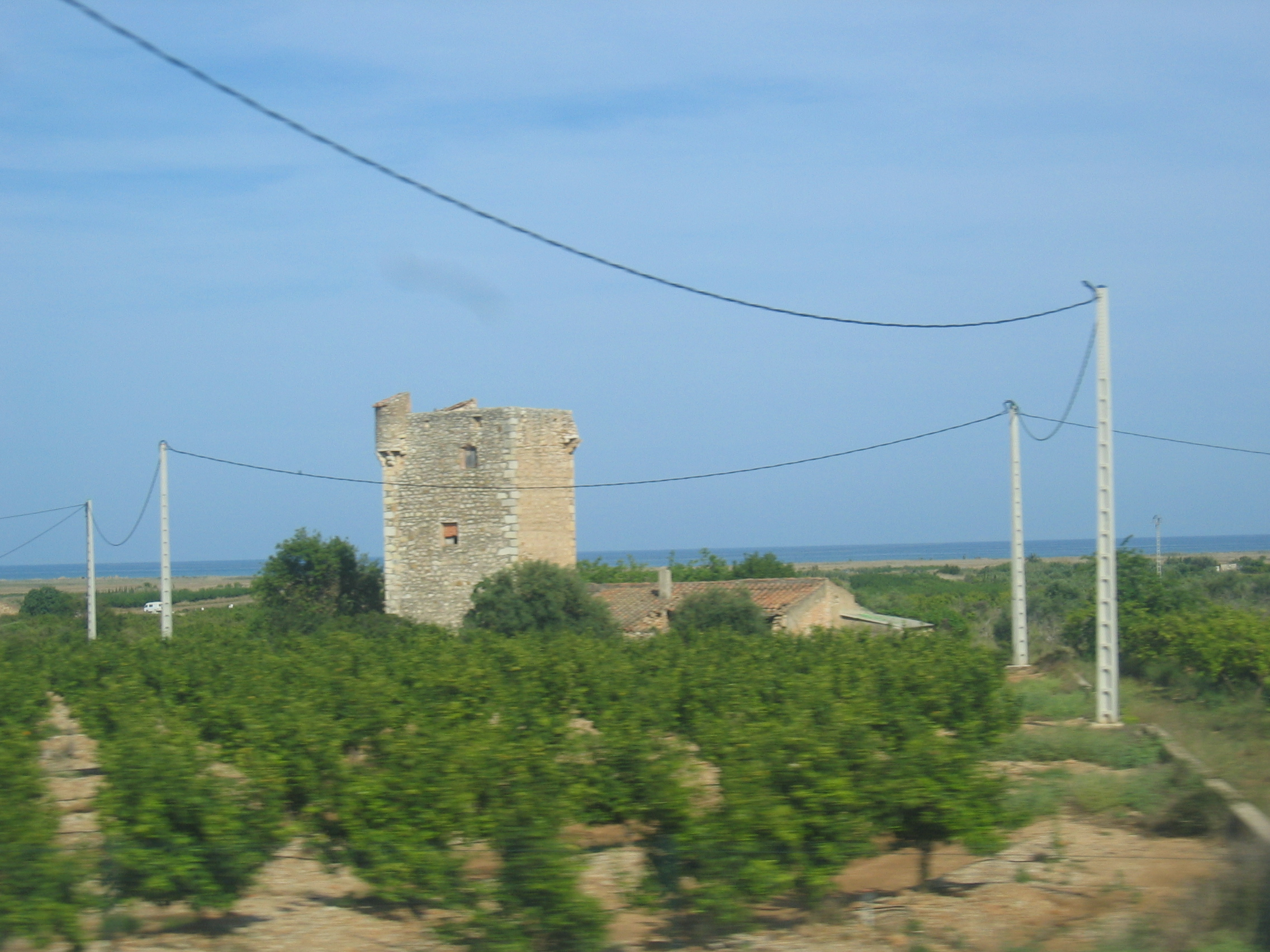 Torre del Carme a Cabanes. Imatge feta des del tren.